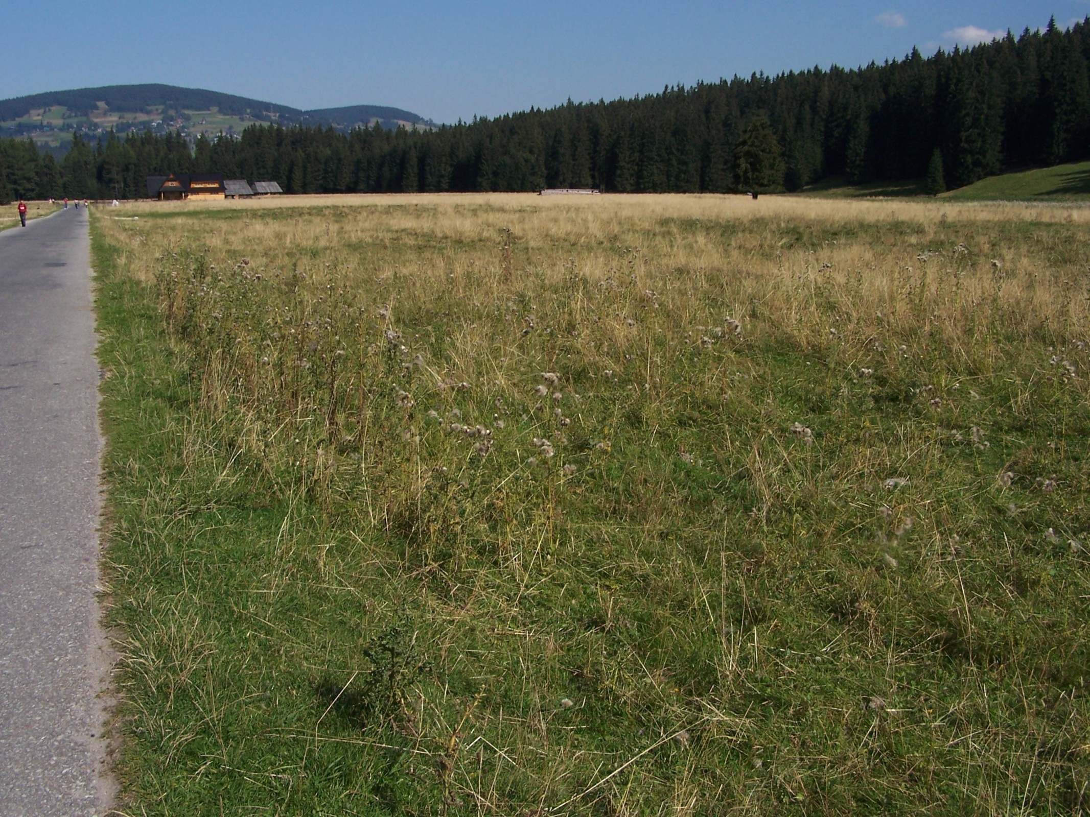 Siwa Polana w Dolinie Chochołowskiej w Tatrach